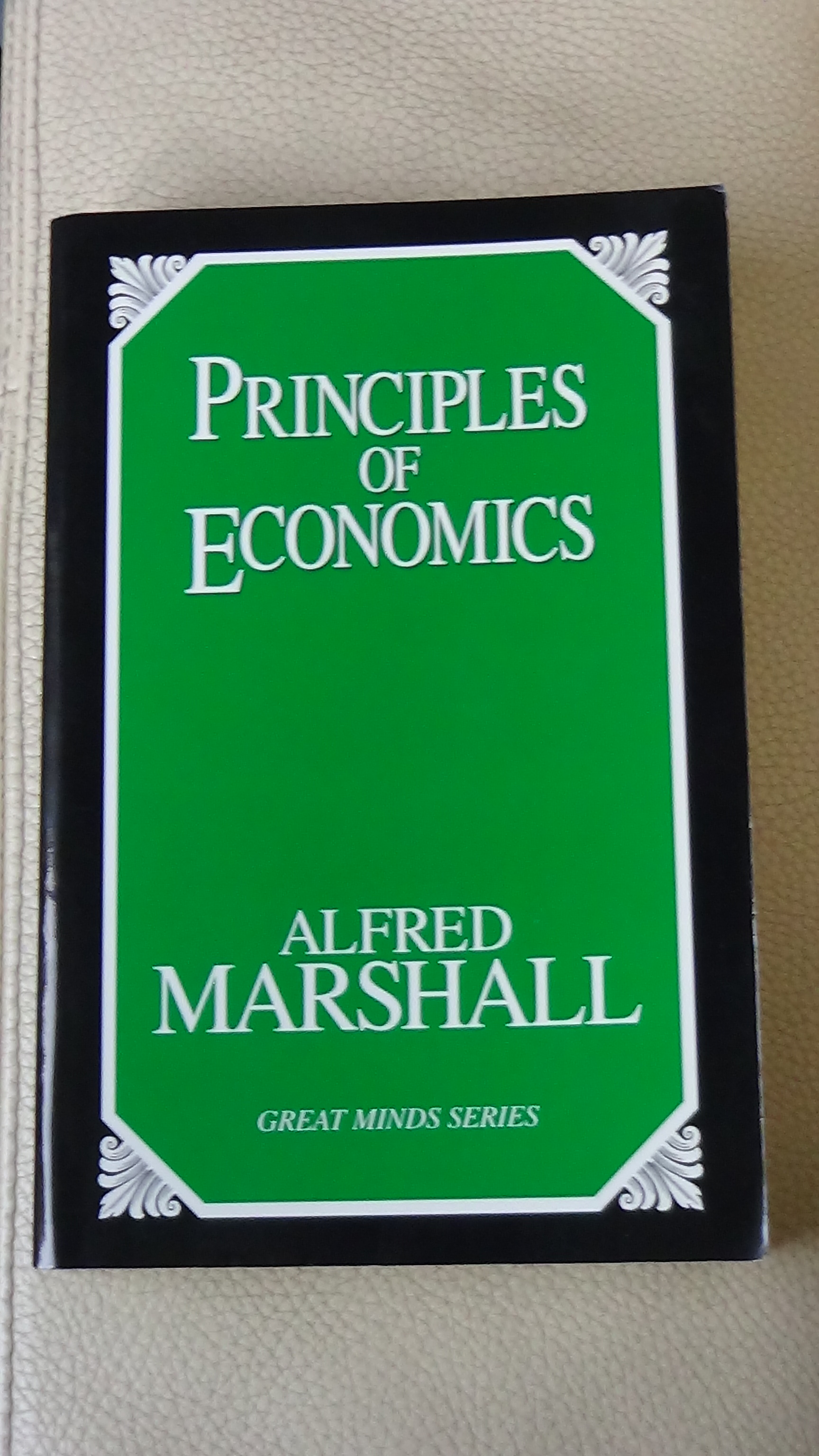 Корица на „Принципи на економијата“, Прометеус букс, Њујорк, 1997.